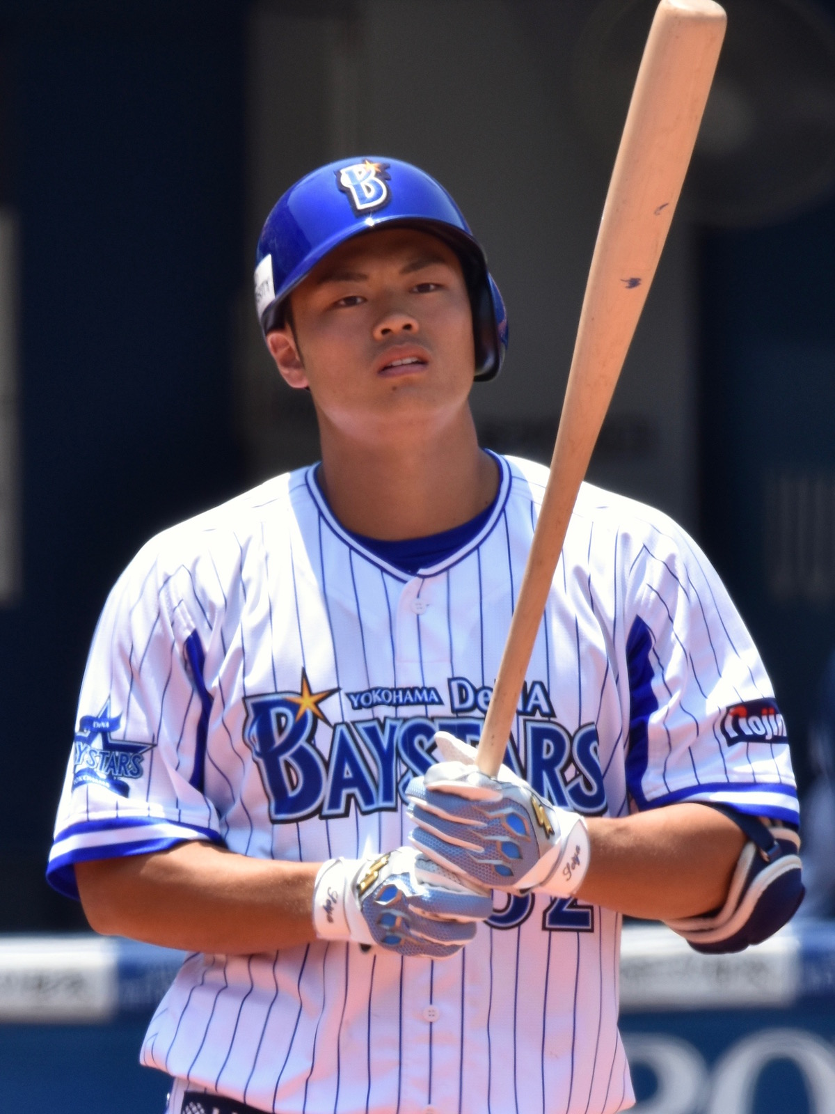 17年6月16日、横浜スタジアムにて撮影